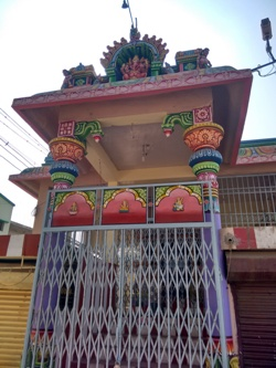 Kumbakonam iluppayadi vinayakar கும்பகோணம் இலுப்பையடி விநாயகர் கோயில்